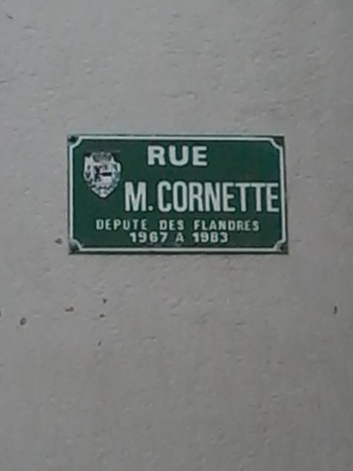 Plaque de rue Maurice Cornette à Bergues